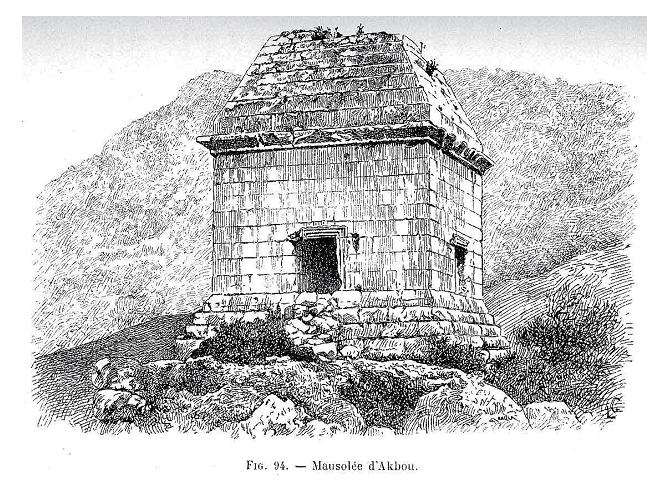 Akbou, Algérie. Mausolée du IIIème siècle. Gravure.